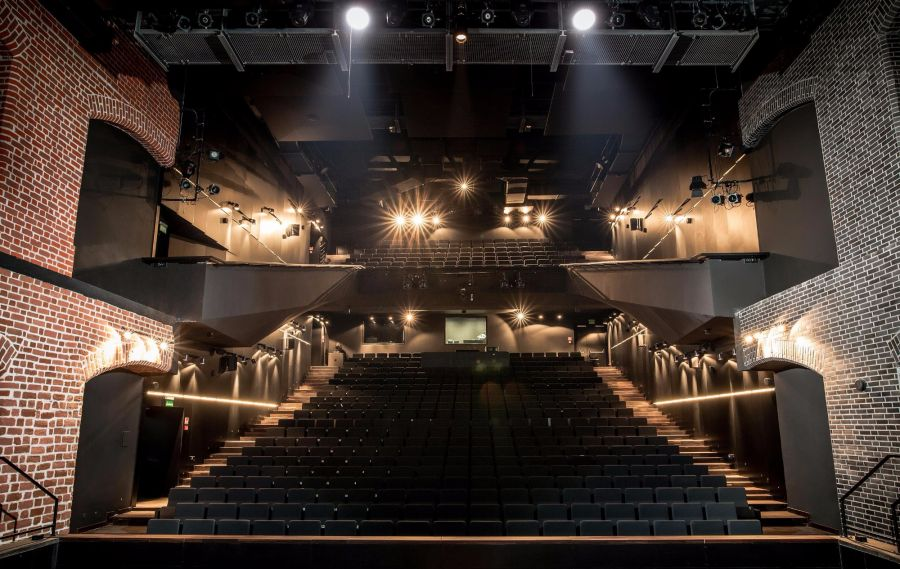 Opera na Zamku w Szczecinie - widownia